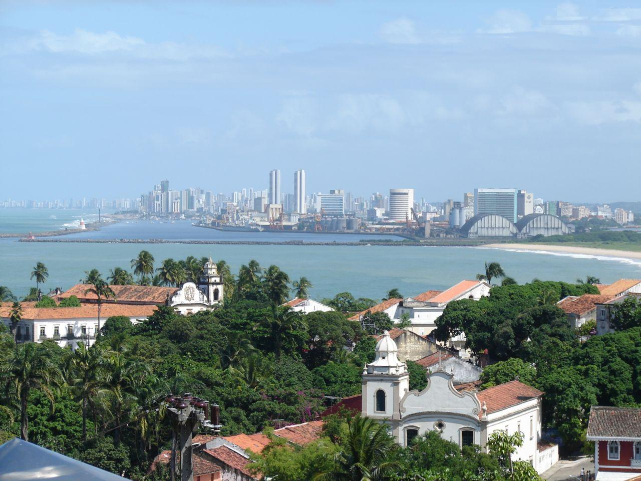 Vista do Sítio Histórico de Olinda